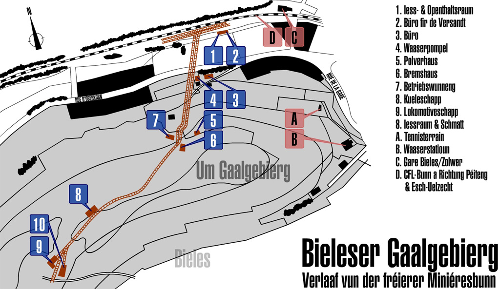 De fréiere Verlaaf vun der Miniéresbunn um Gaalgebierg Allgemenges zum Bild: Dëst Bild weist den fréieren Verlaf vun der Minièresbunn um Bieleser Gaalgebierg. Déi rout/brong agezeechend Linne weisen d'Schinnen, déi et haut net méi ginn. Déi rout/brong Rechtecker stellen d'Häiser duer, déi et haut nëmmen nach als Ruine ginn. Kategorie:Gemeng Suessem